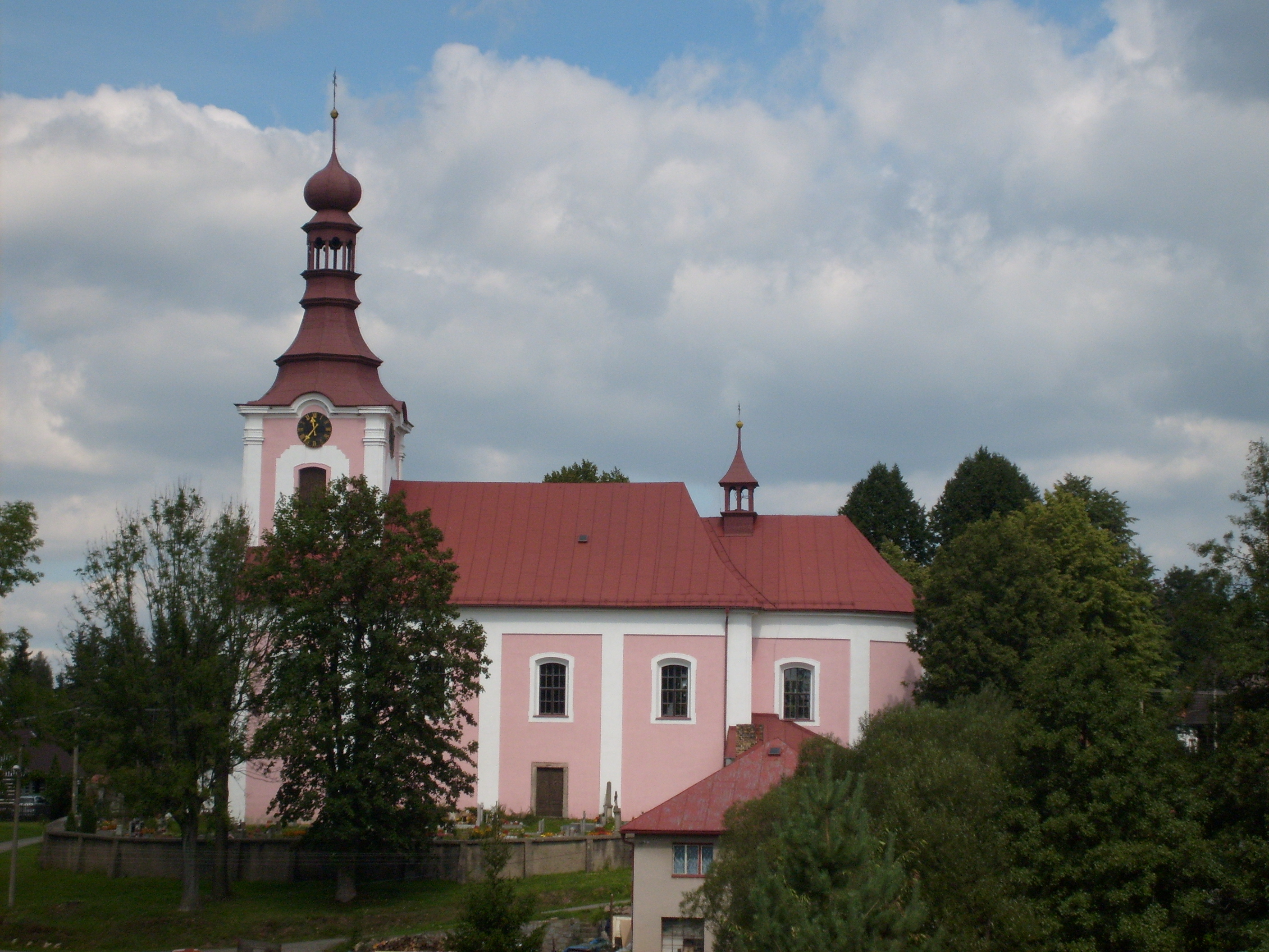 Kostel svatého Mikuláše v Dobřanech, Rychnov nad Kněžnou District, Hradec Králové Region, Czech Republic